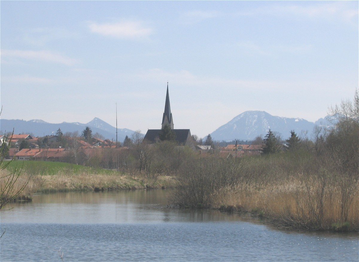 Mühlweiher, Sachsenkam, Oberbayern